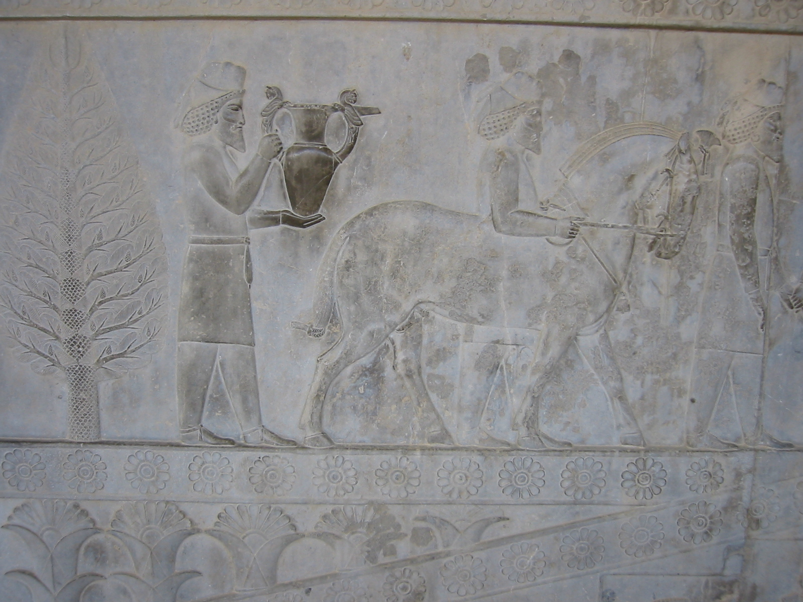 Eigen foto